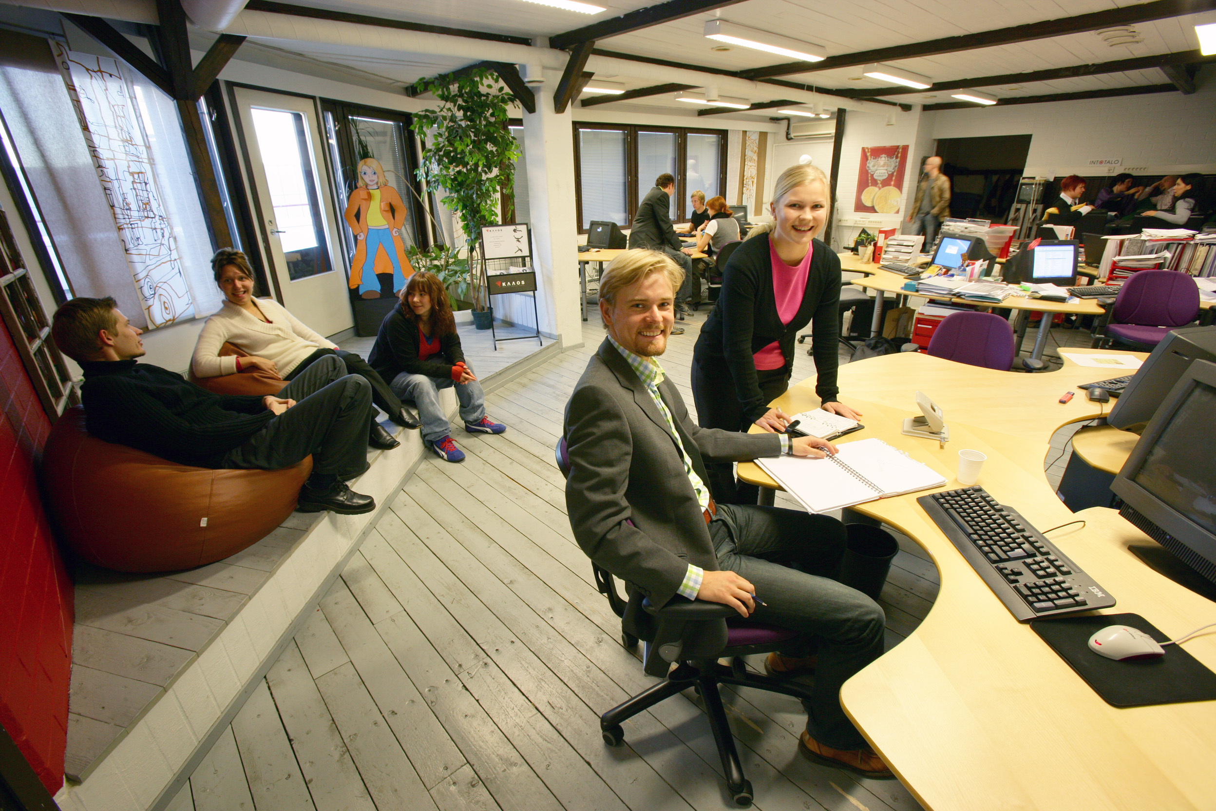 Kajaanin Intotalo, avokonttoti